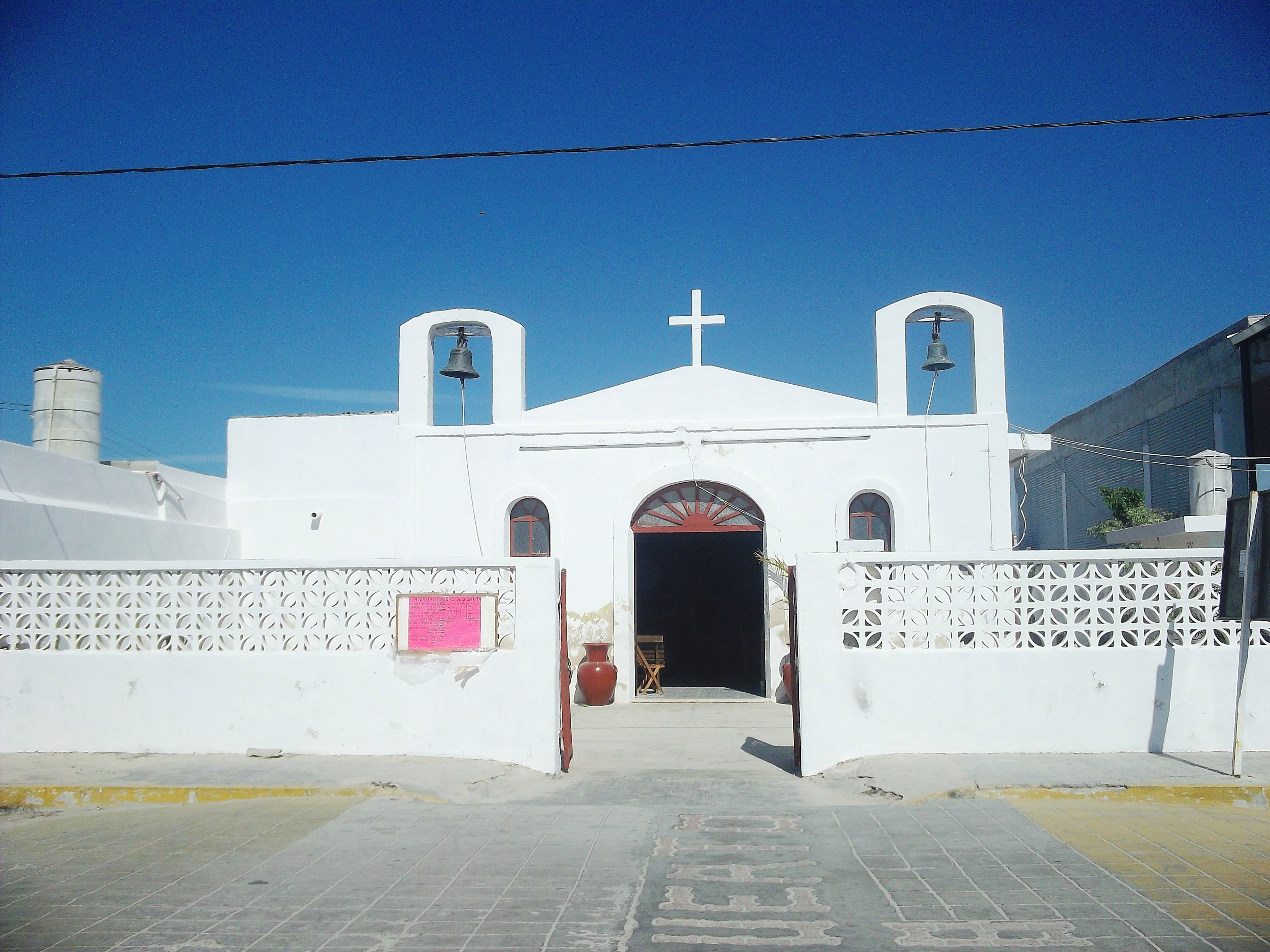 Iglesia de Telchac Puerto, Yucatán.